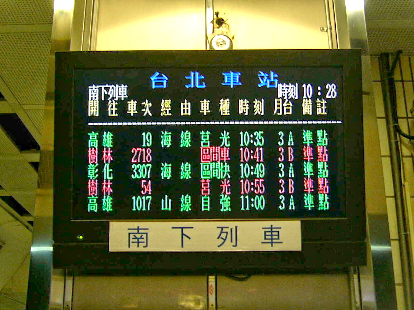 臺灣鐵路管理局臺北車站第三月台的最近五班南下列車資訊顯示器，1990年代至2013年採用倚天中文系統。